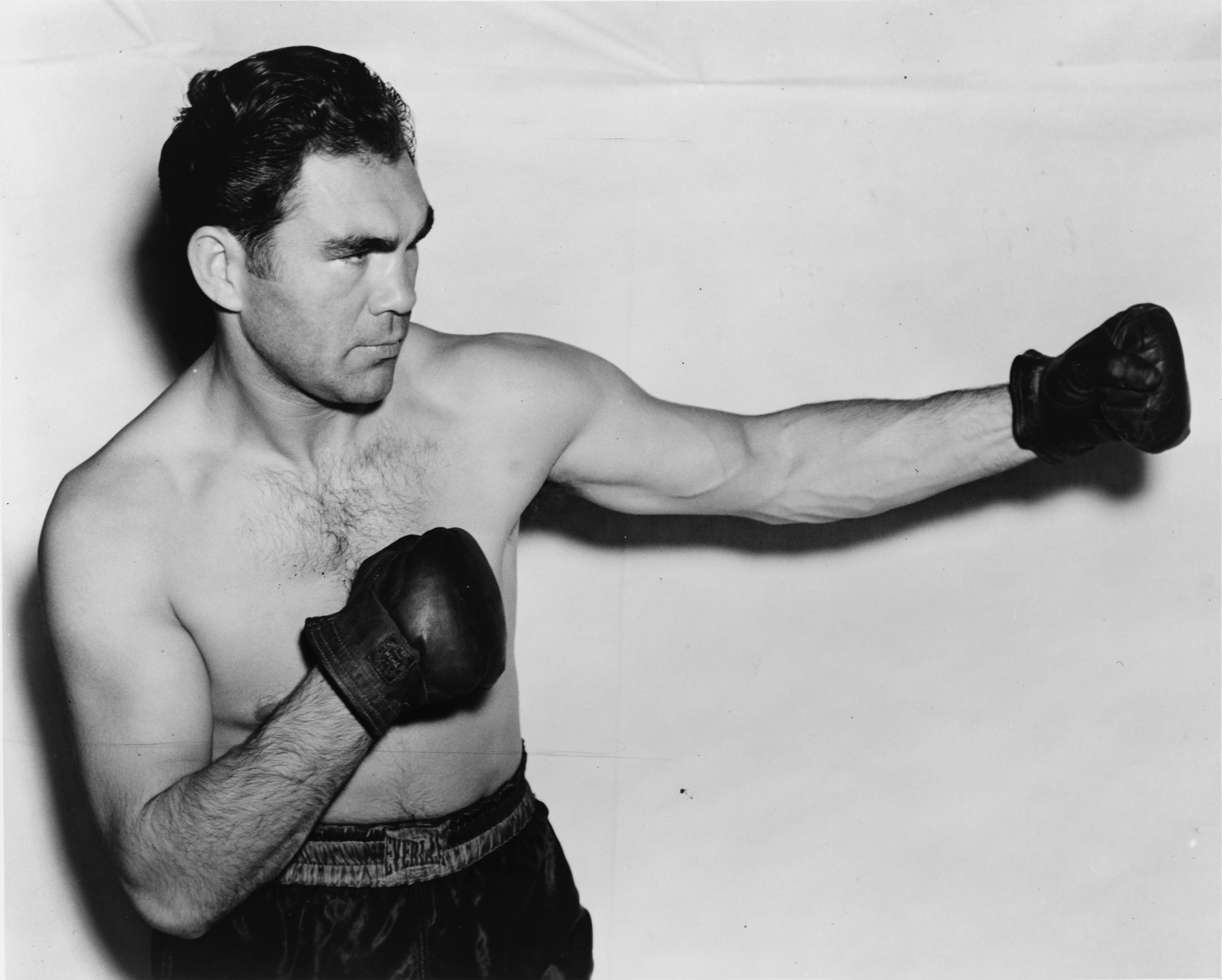 Max Schmeling, German boxer